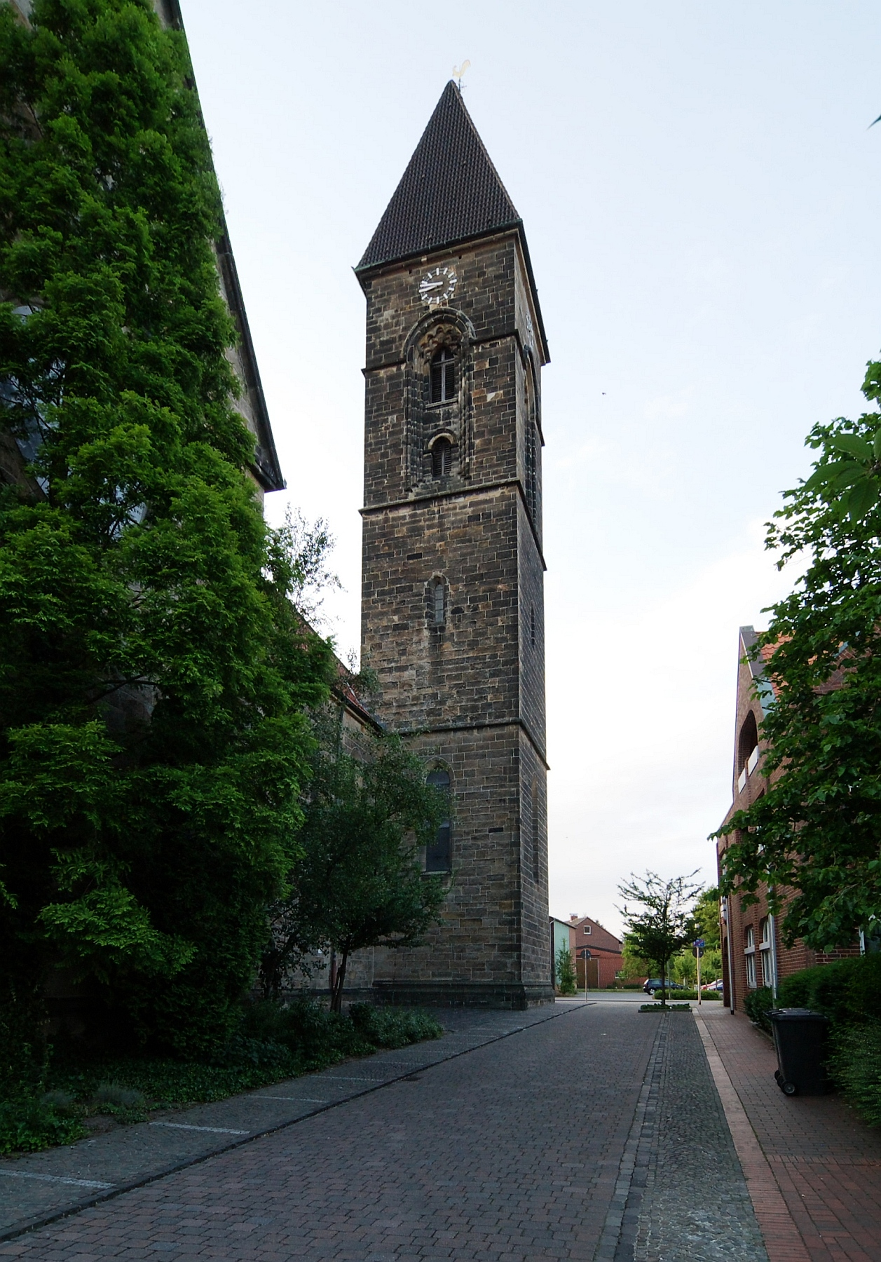 St. Stephanus in Hamm Bockum-Hövel